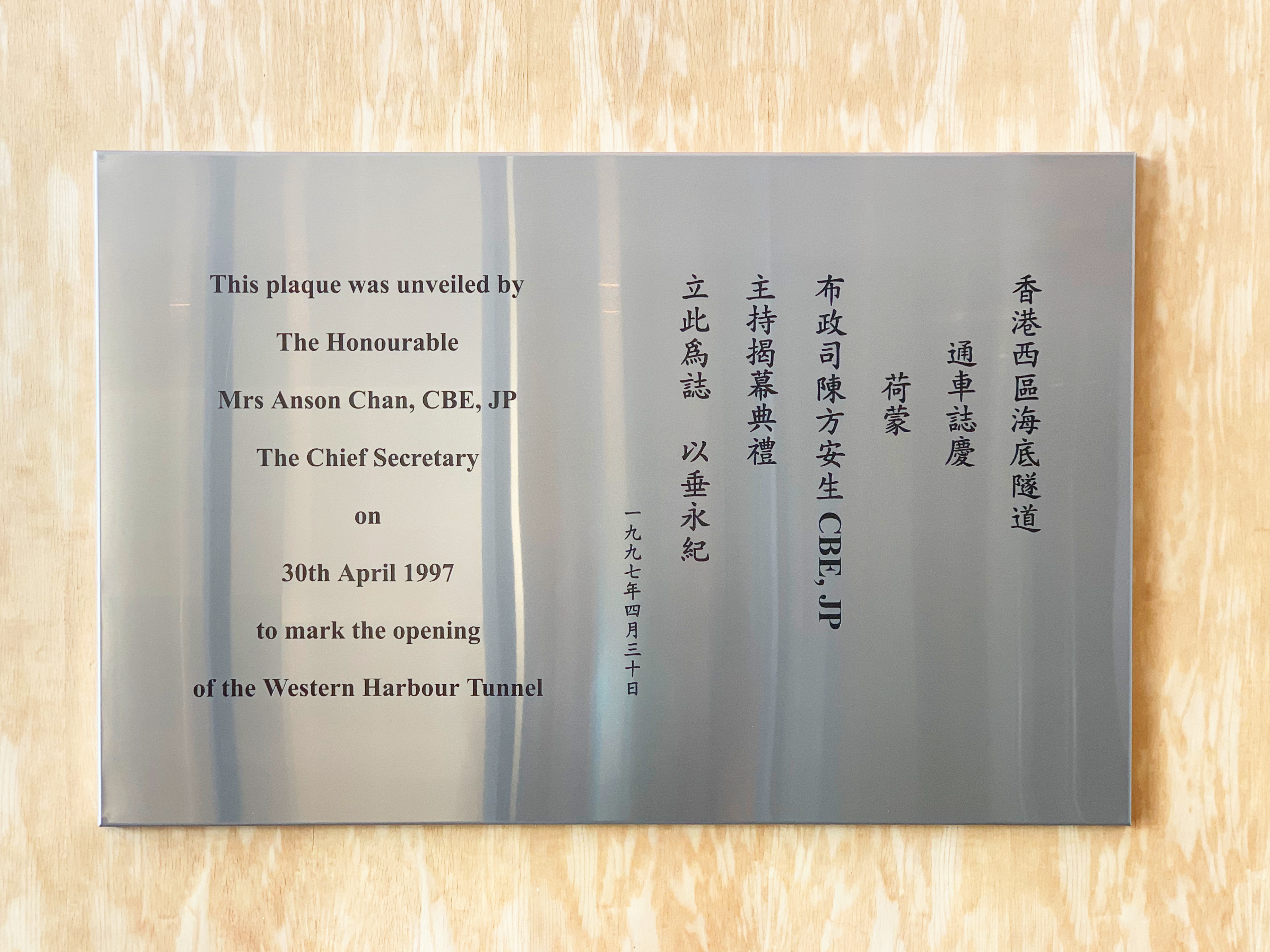 中文（香港）: 時任布政司陳方安生於1997年4月30日，主持西隧揭幕典禮紀念牌匾。